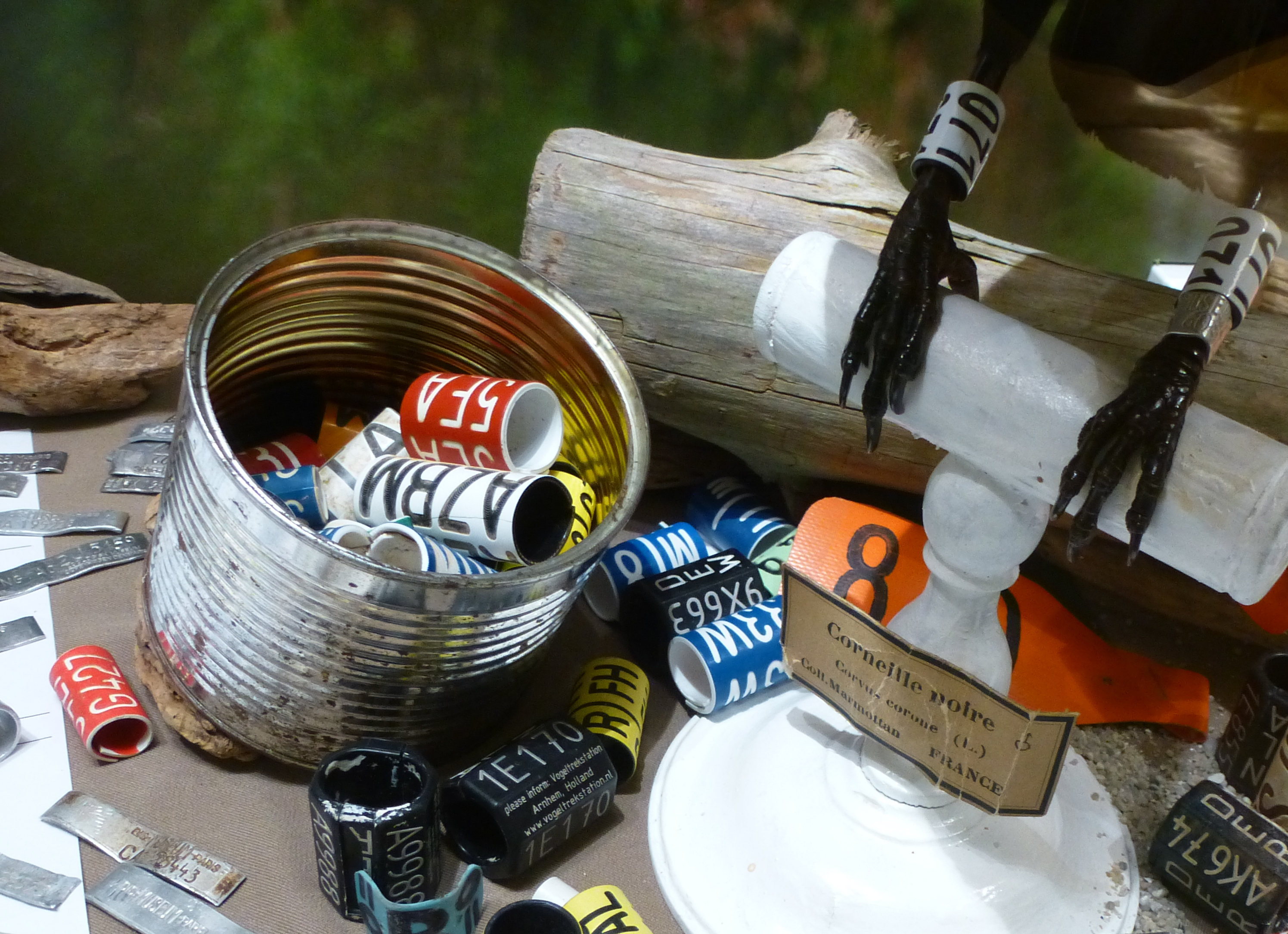 Baguage ornithologique et Corvus corone. MNHN, Paris